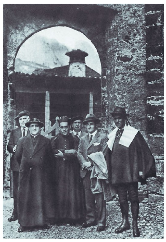 Jose Antonio Agirre, nazionalismoaren aldeko ekitaldi batean, Izaban (Nafarroa), 1932ko urrian.